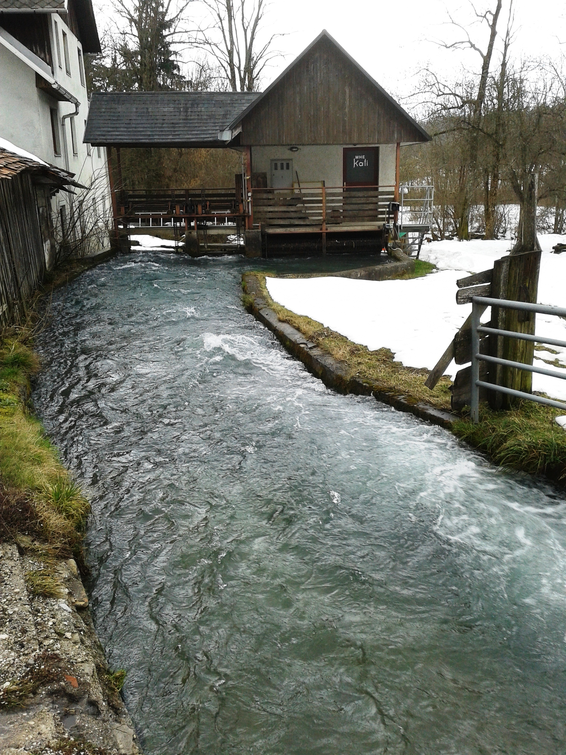 mlinščica vodotoka Tržiške Bistrice, MHE na Tržiški Bistrici, Retnje